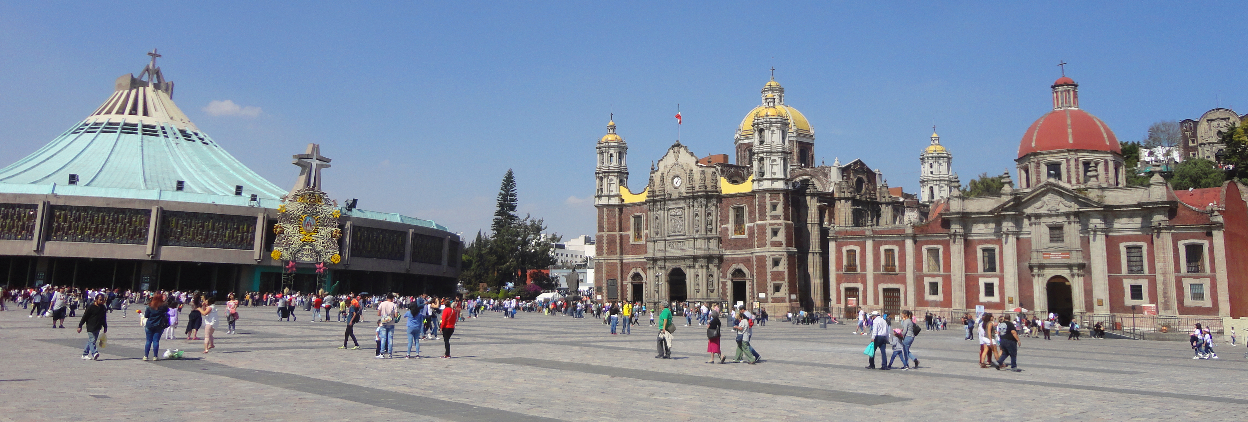 Atrio de las Américas - La Villa - Basílica de Guadalupe - Ciudad de México